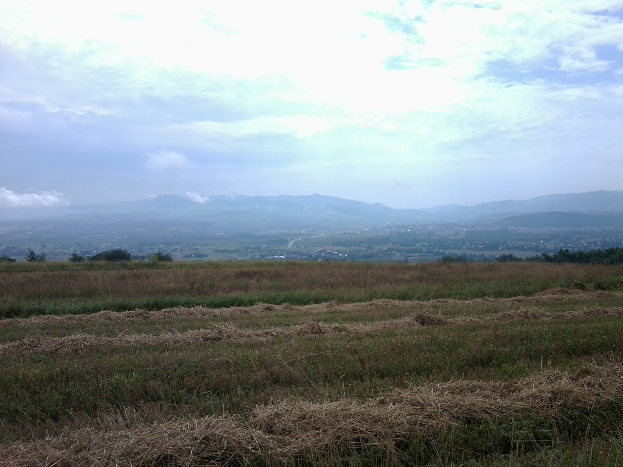 Panorama Kotliny Sądeckiej z Chochorowic